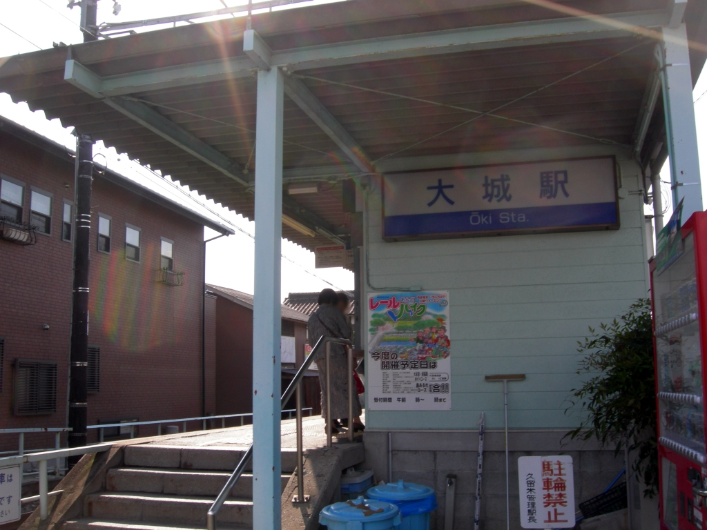 西鉄甘木線・大城駅（2006年9月自身撮影）